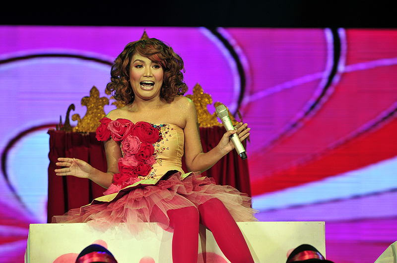 Elyana membuat persembahan lagu di peringkat akhir Anugerah Juara Lagu ke-23 (2009).